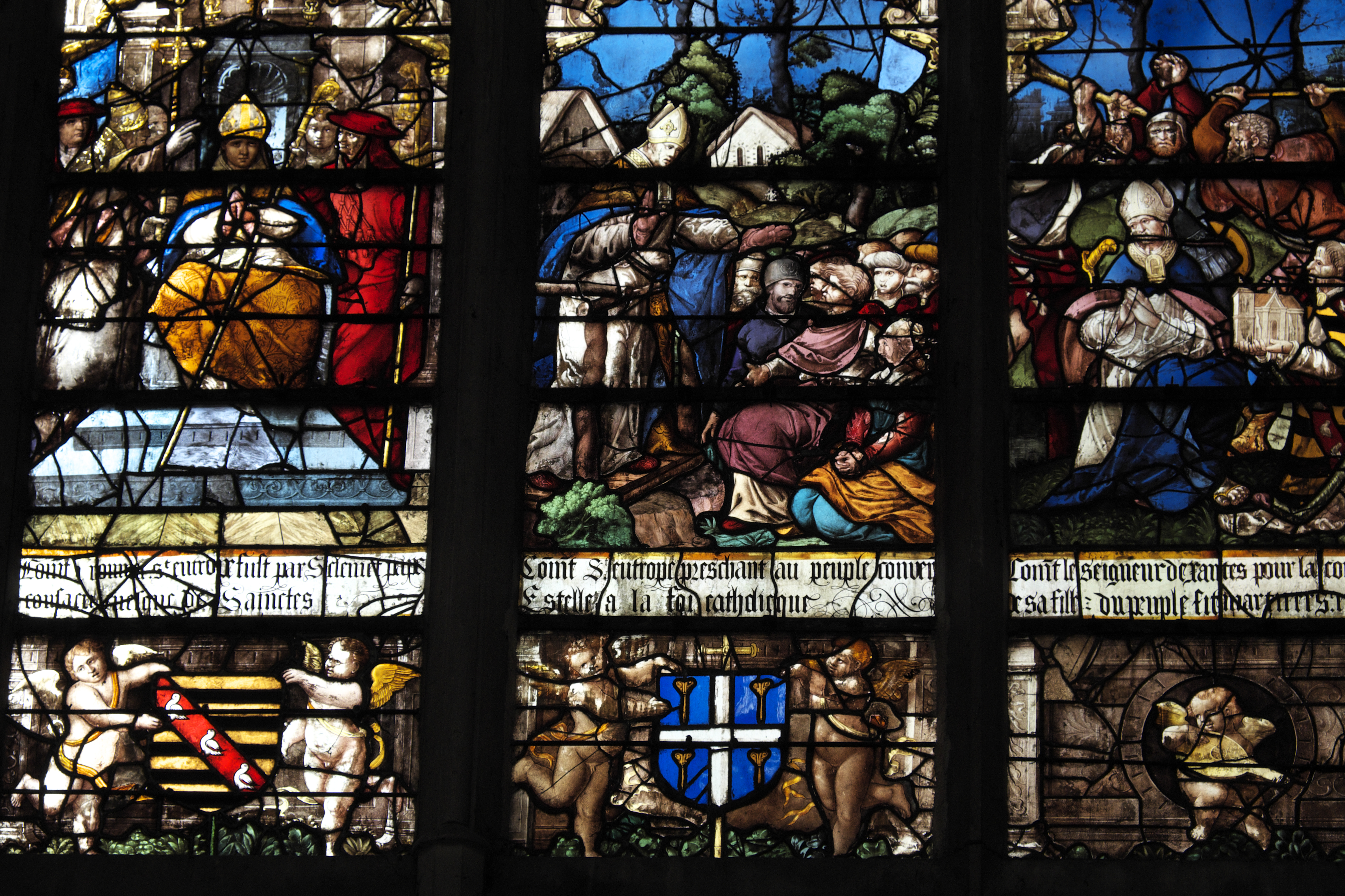 Kathedrale Saint-Étienne in Sens im Département Yonne (Burgund/Frankreich), Bleiglasfenster (baie 34), 1530 von Jean Cousin dem Älteren geschaffen, 1877 von Gérente restauriert, Darstellung: Legende des hl. Eutrope, mit Texten in Mittelfranzösisch; im Maßwerk: Christus als Weltenherrscher, umgeben von den Evangelisten